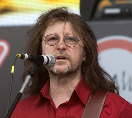 Александр Кутиков, "Машина времени". Фестиваль "Рок над Волгой 2010"